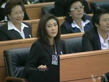 Yingluck Shinawatra